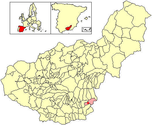 Situación de la localidad de Jorairátar (en el municipio de Ugíjar) respecto a la provincia de Granada, en España.